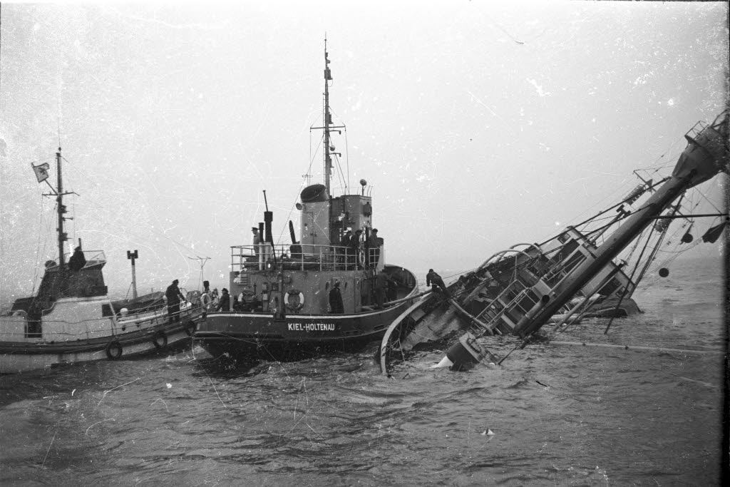 Untergang nach Rammen durch den Frachter SATU (finn.). Im Bild links der Schlepper FLEMHUDE und das Seenotrettungsboot SPIEKEROOG.